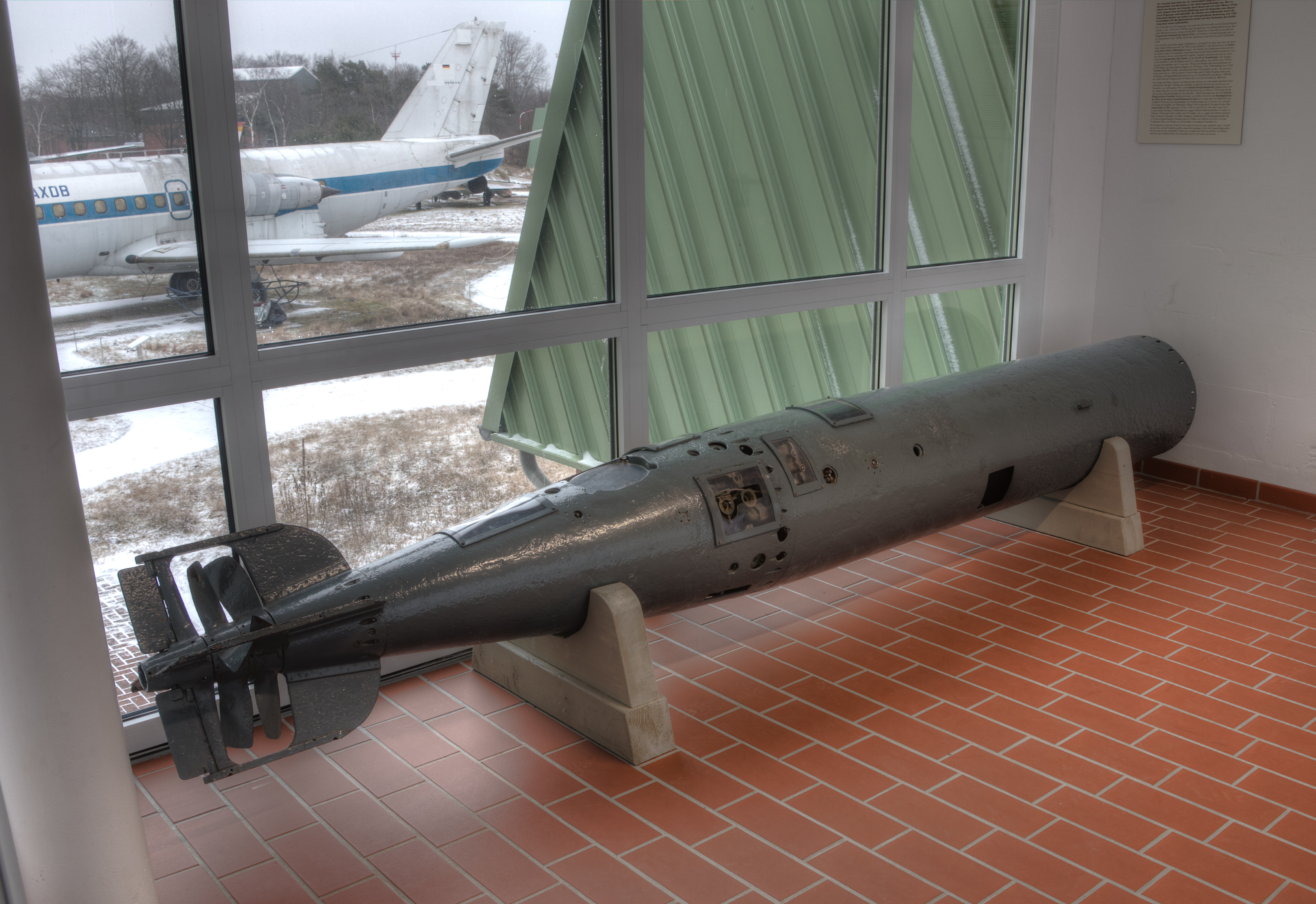 Torpedo im Museum Aeronautikum Nordholz